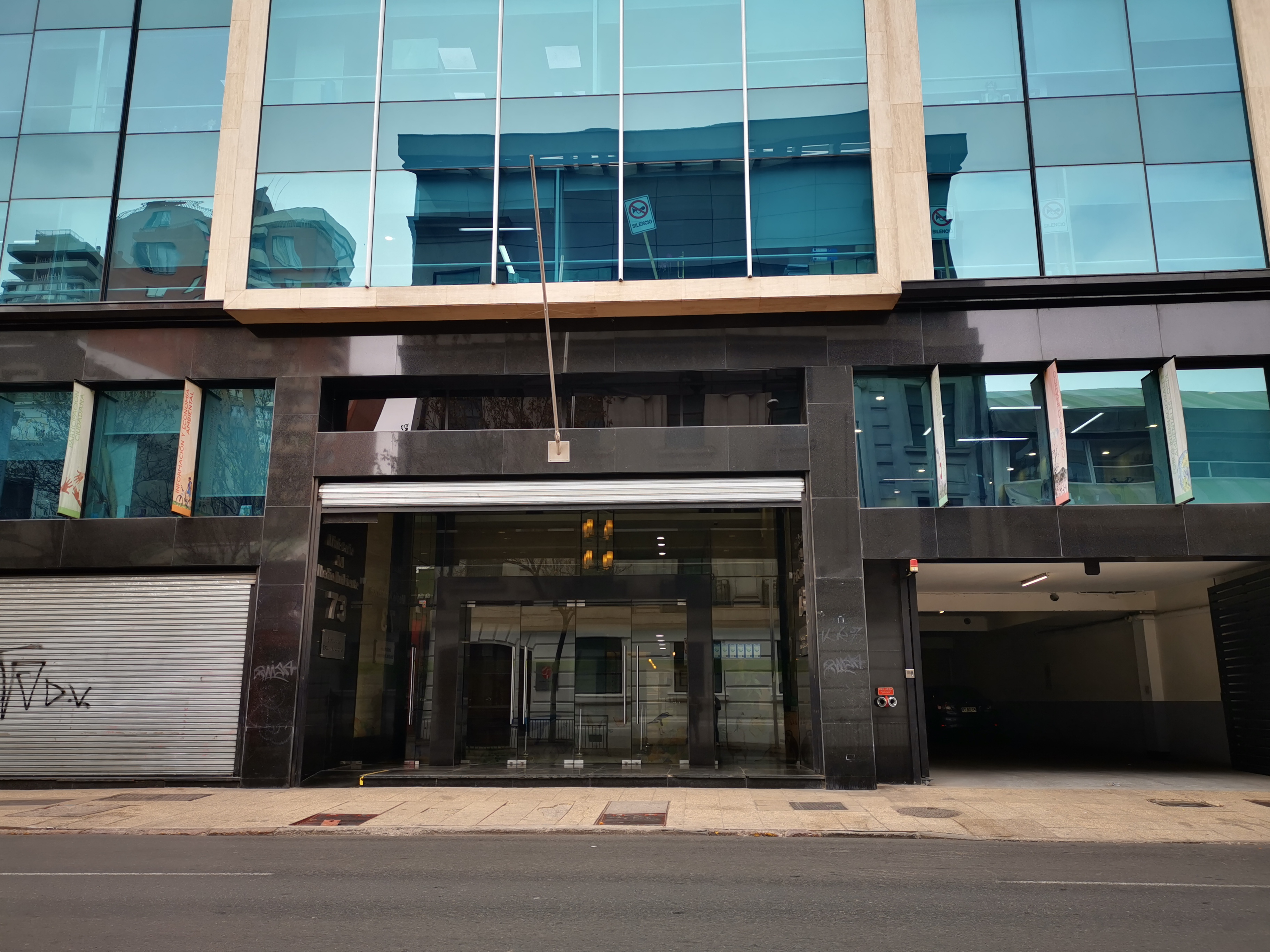 Edificio que alberga al Ministerio del Medio Ambiente de Chile.